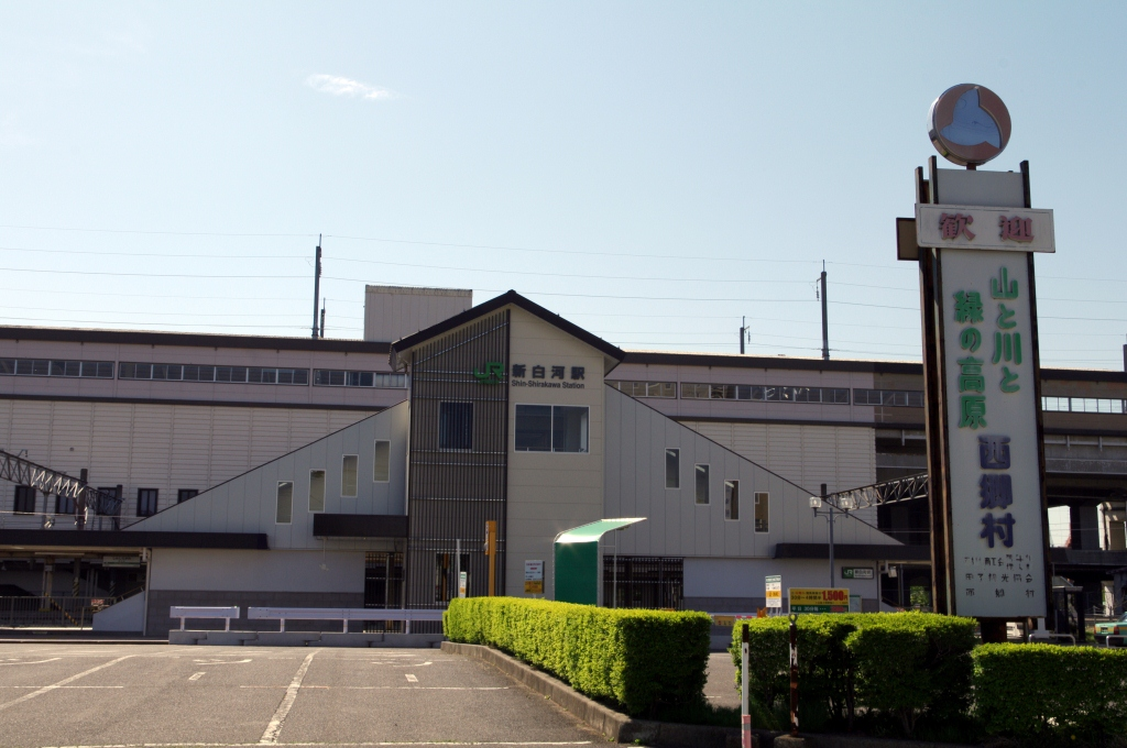 東日本旅客鉄道東北本線、東北新幹線新白河駅